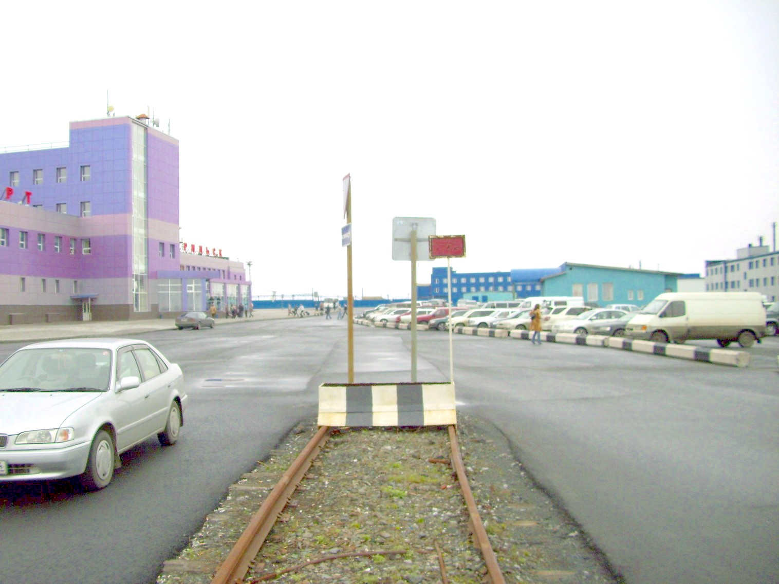 Норильская железная дорога, ветка в аэропорт Алыкель